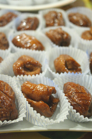 sigrid verbert